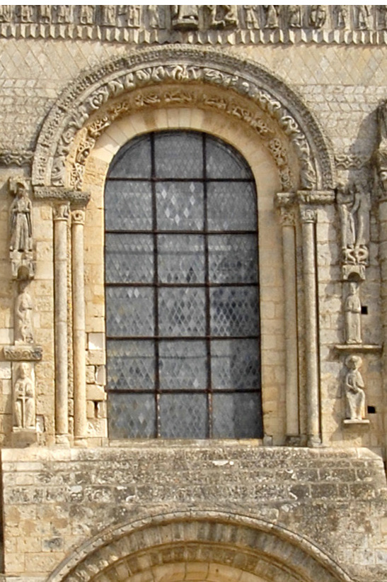 Sain-Jouin-de-Marne, Zentrales Archivoltenfenster